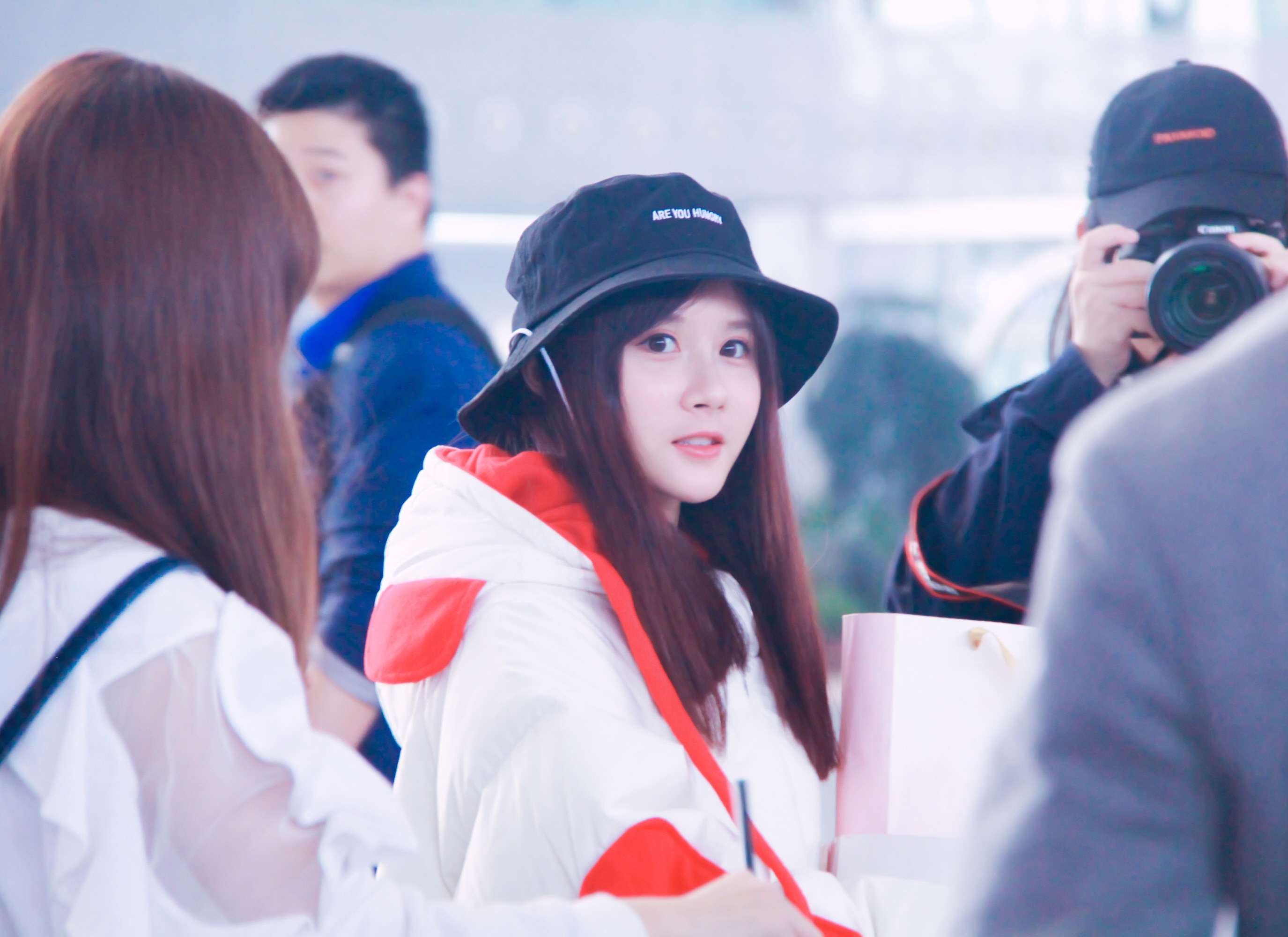 20180315南京南 段艺璇